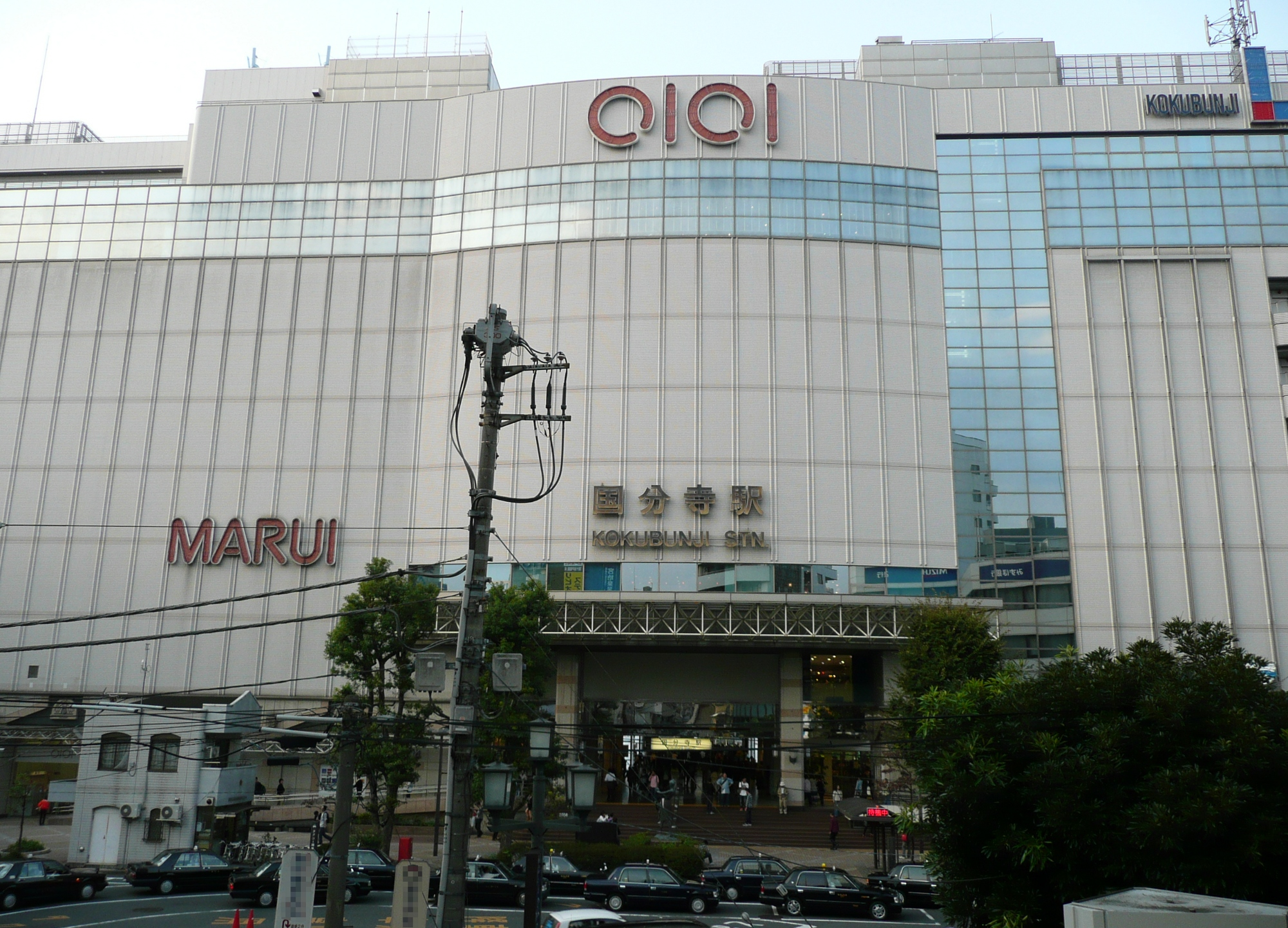 国分寺駅南口